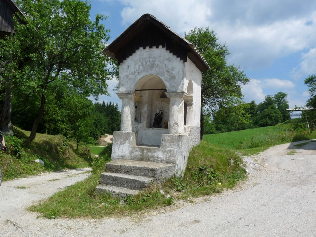 Kapelica pri Jablani